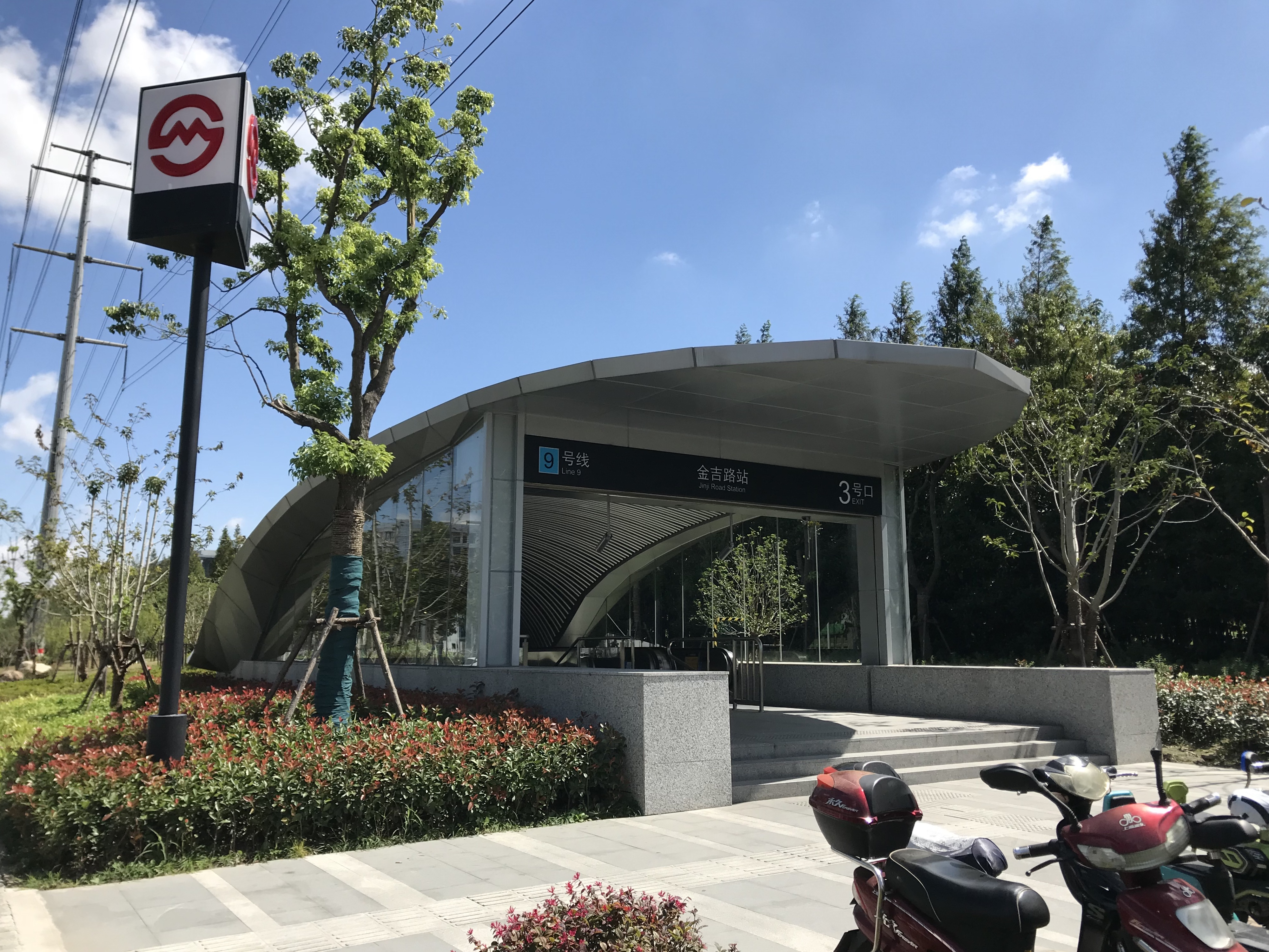 金吉路駅の3番出入り口